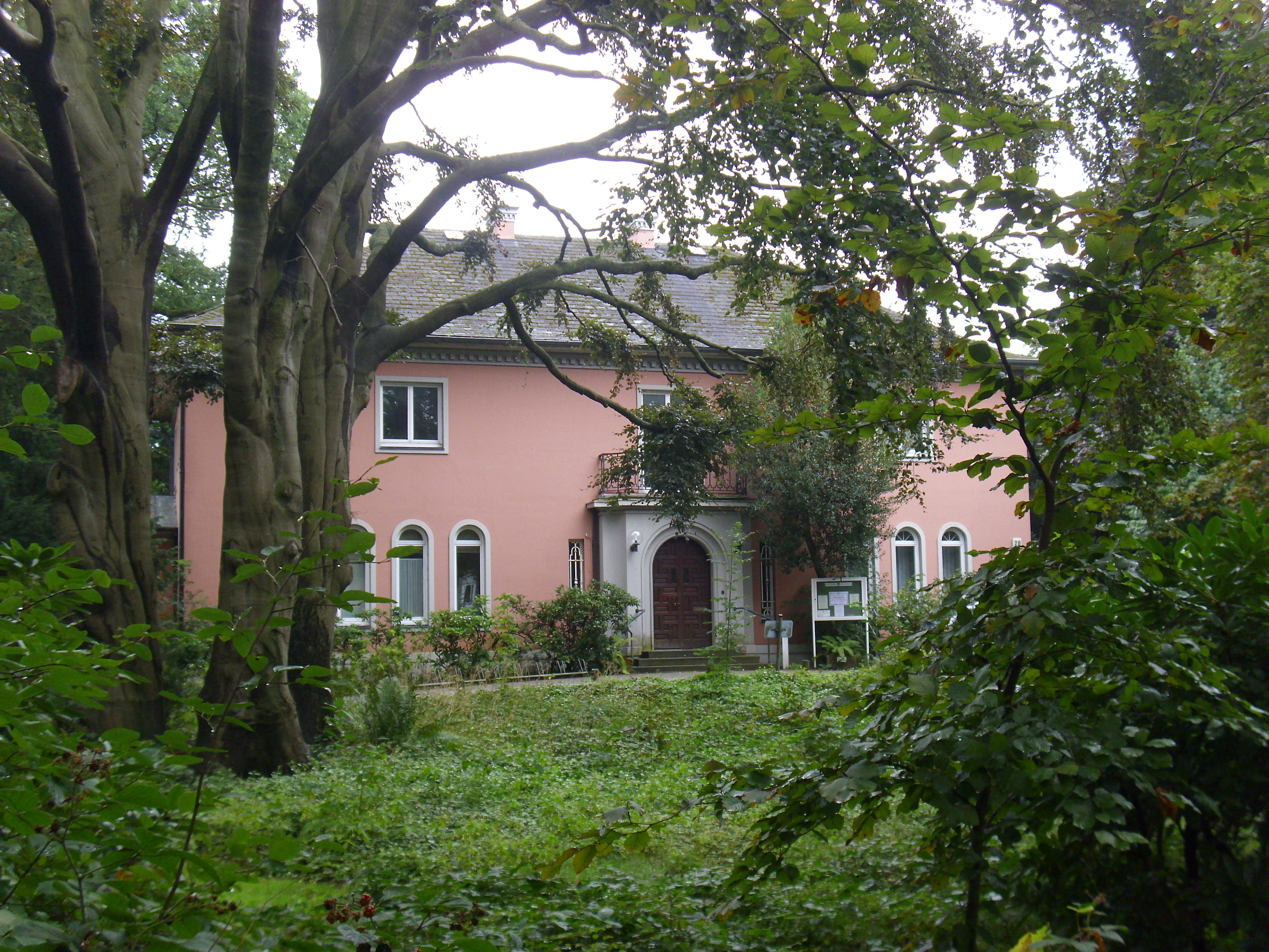 Ohlendorffsche Villa, Im Alten Dorfe 28 This is a photograph of an architectural monument.